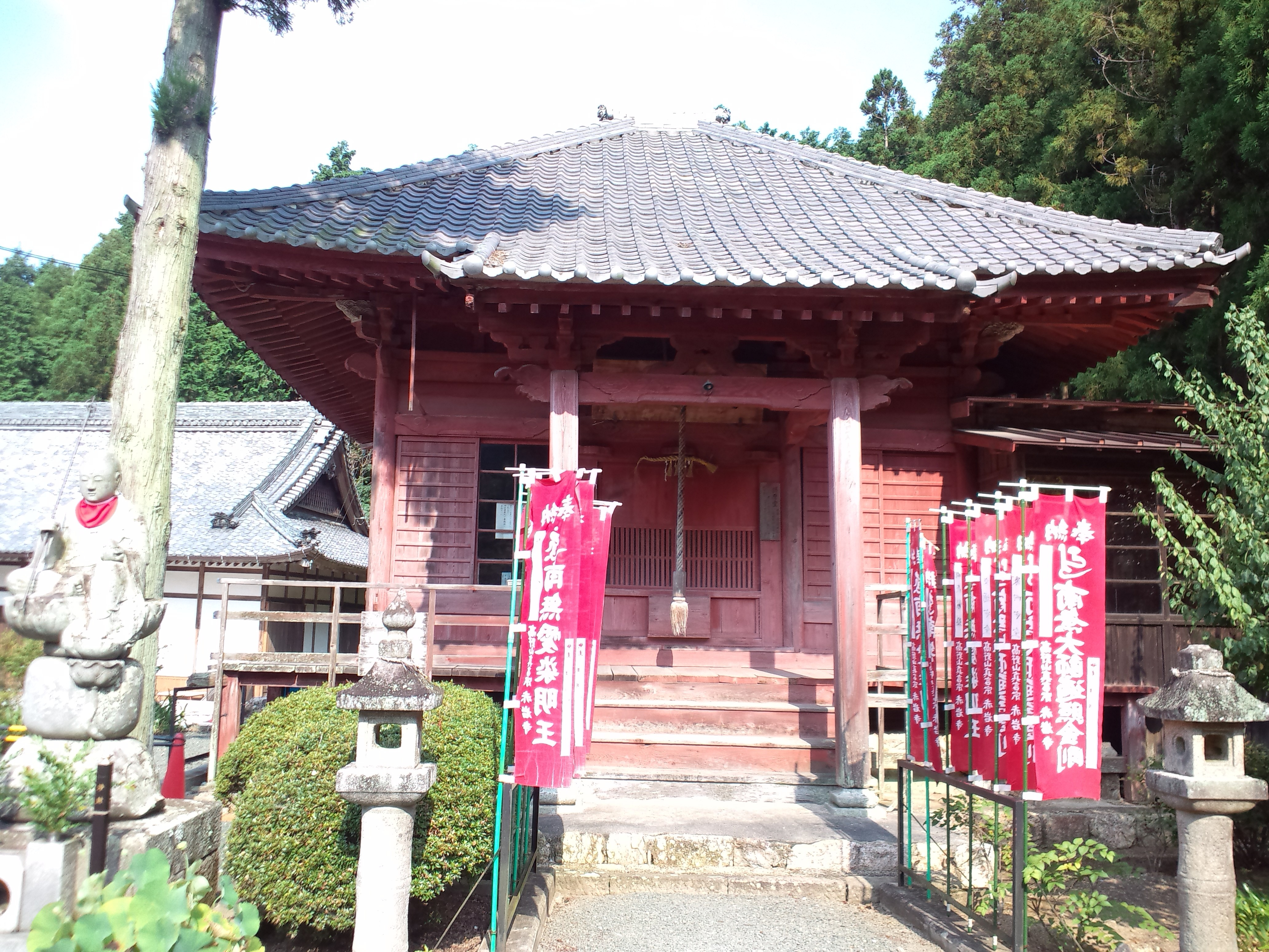 赤岩寺 愛染堂